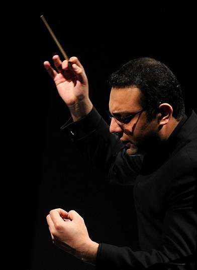 بردیا کیارس در بیست‌ و هفتمین جشنواره بین‌المللی موسیقی فجر ۲۸ بهمن ۱۳۹۰